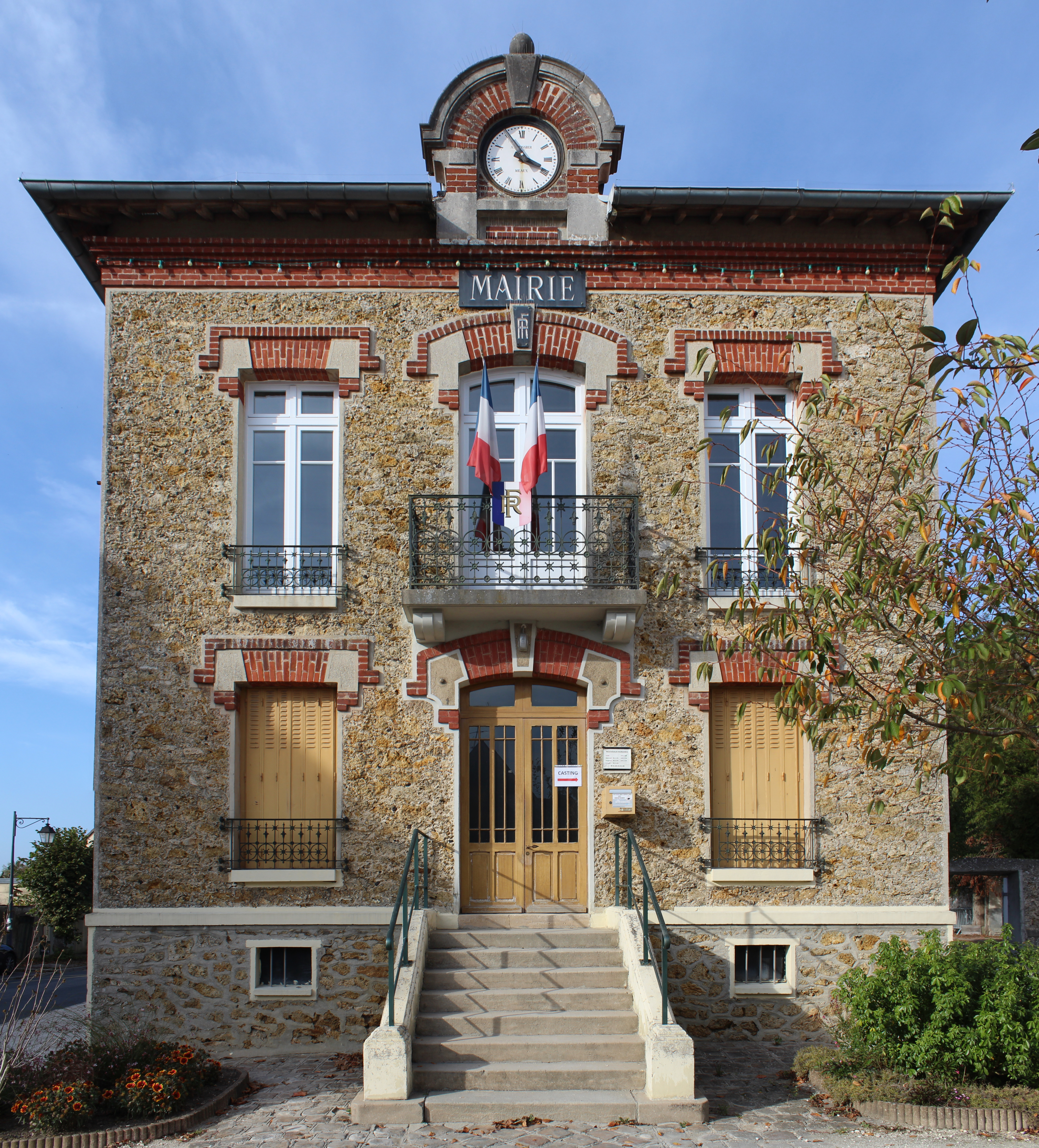 Mairie de Villeneuve-Saint-Denis.